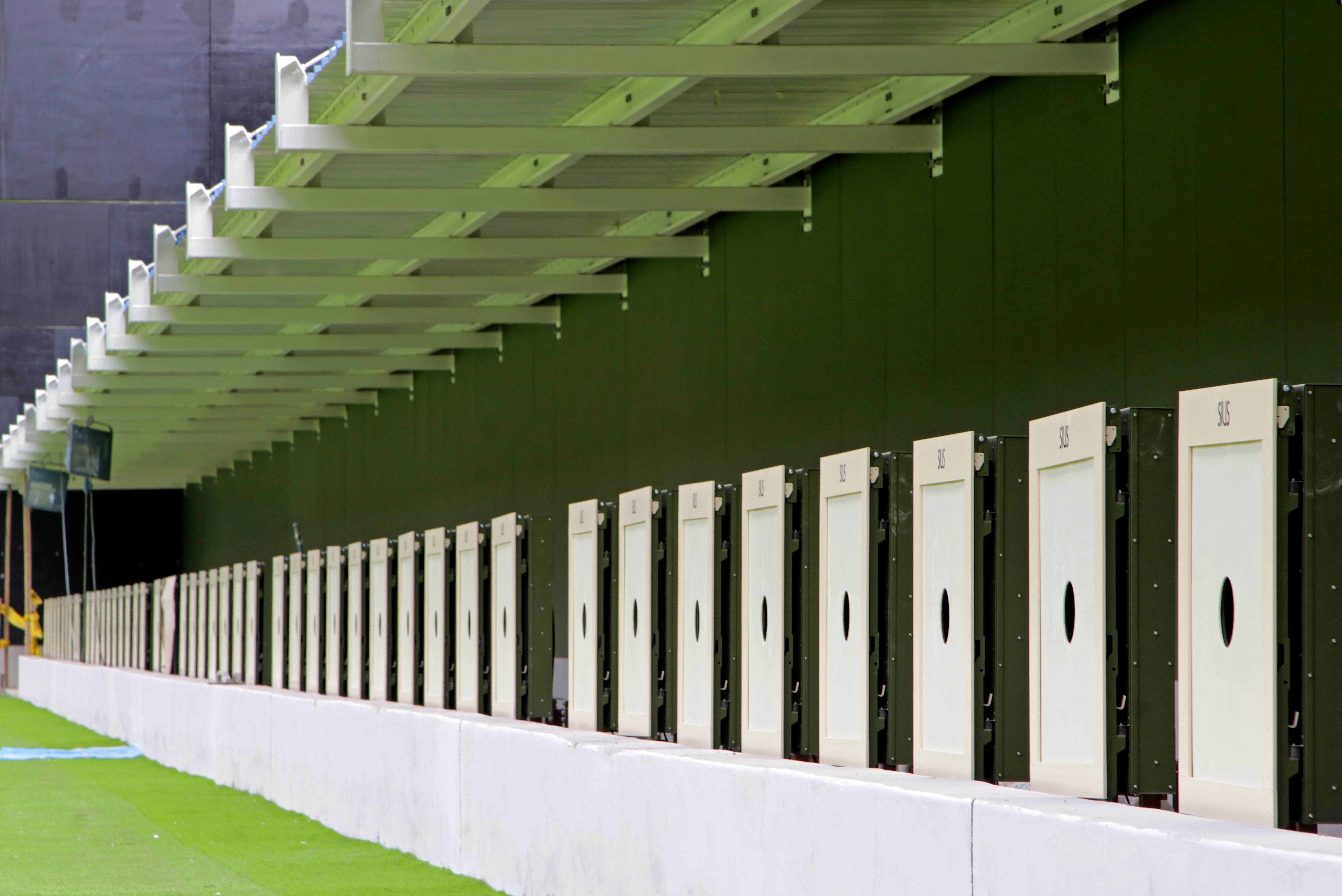 Sede de los Juegos Panamericanos y Parapanamericanos de 2019